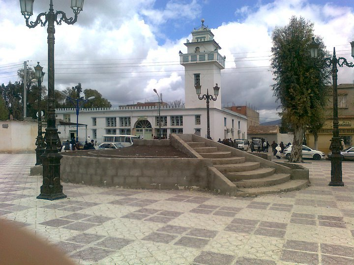 مسجد عقبة بن نافع